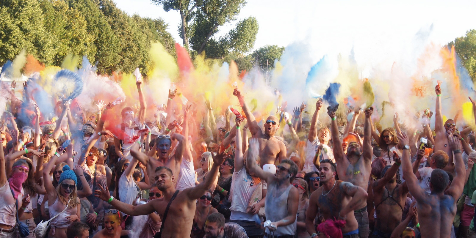 Germany 2012 Holi, fest der farben